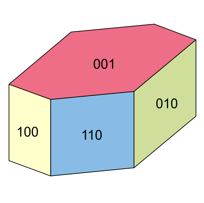 Kristallzeichnung eines Huemulit-Kristalls unter Zugrundelegung einer Vorlage von Carlos E. Gordillo, Enrique Linares, Roberto O. Toubes und Horace Winchell (1966): „Huemulite, Na4MgV10O28·24H2O, a new hydrous sodium a magnesium vanadate from Huemul mine, Mendoza province, Argentina“. - The American Mineralogist 51 (1–2), Seite 6.